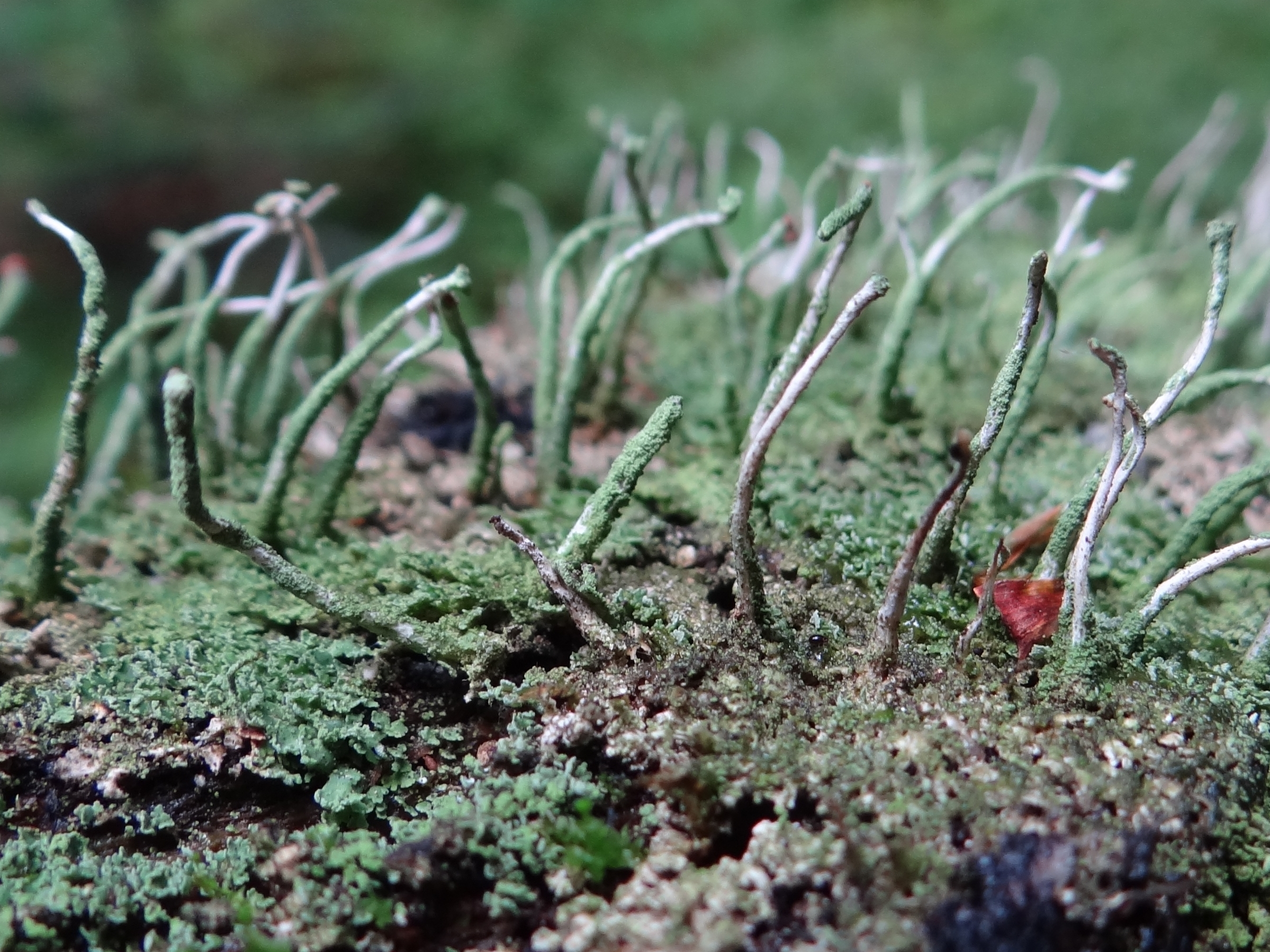 Cladonia glauca (location: Poland, Rajbrot, Paproć)